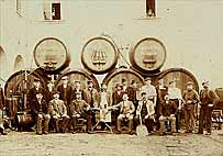 Historisches Bild der Brauerei Aldersbach